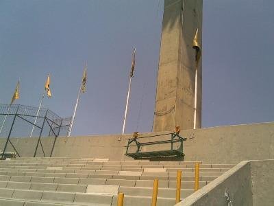 La Hamaca para Construccion o Tambien Conocida como Andamio Colgante o Guindola es un Equipo Utilizado en las Construcciones para Realizar Trabajos en Alturas, en lugares donde no es posible colocar Andamios Tradicionales, Estos Equipos Son Muy Seguros Cuando Son Utilizados Por Personal Capacitado